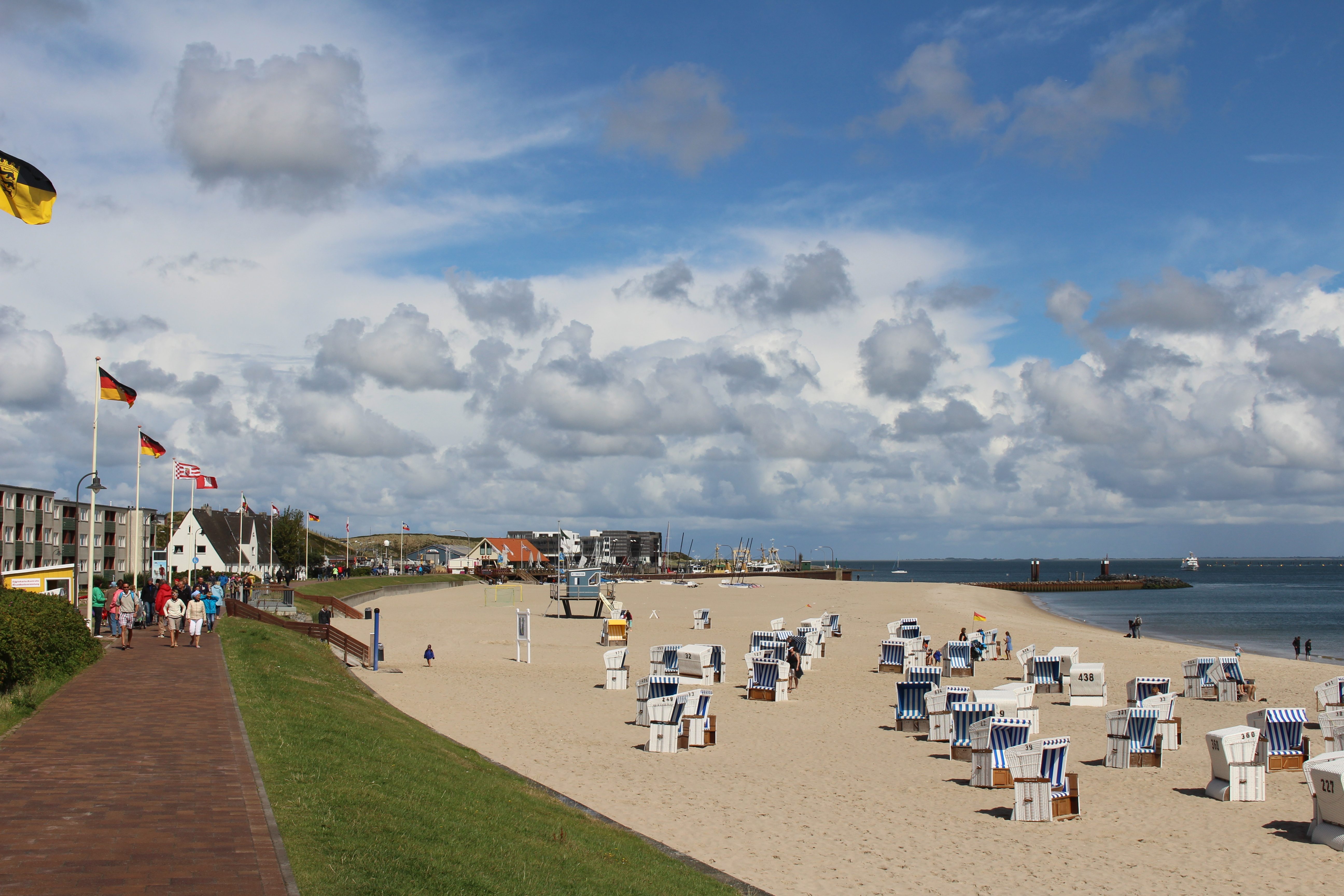 Promenade von Hörnum auf Sylt, Blick Richtung Hafen